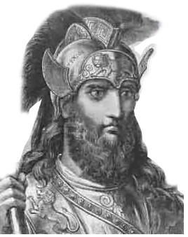 heroe